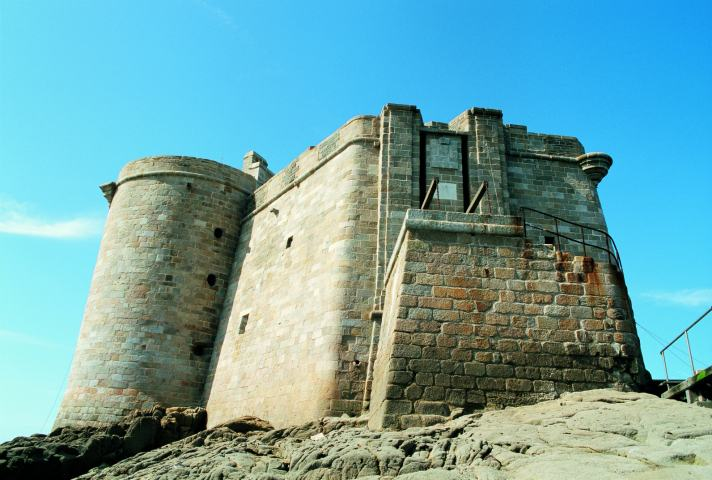 Vue du fort du Taureau à marée basse.